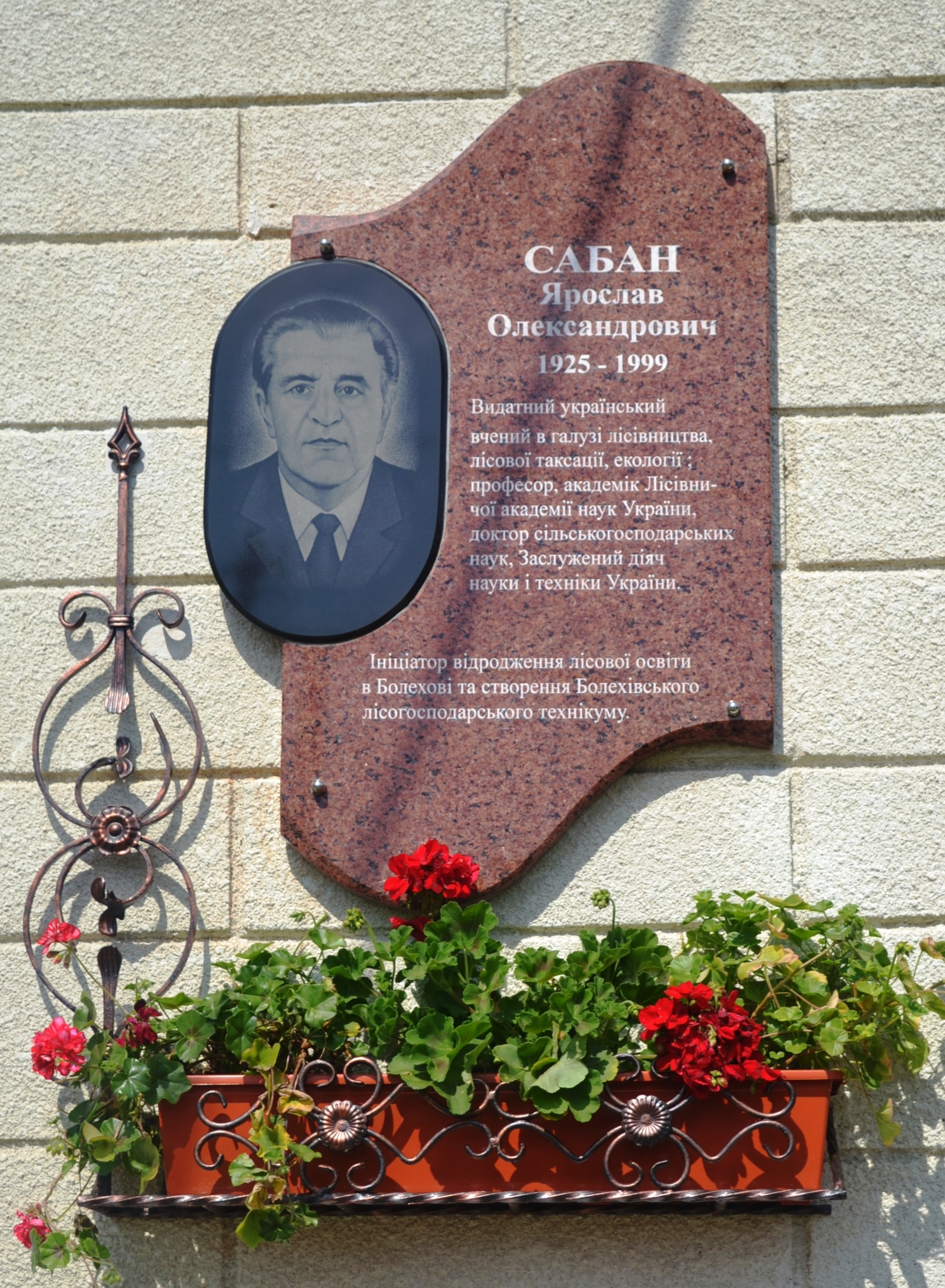 Меморіальна дошка Я.О.Сабану на корпусі №2 Прикарпатського лісогосподарського коледжу